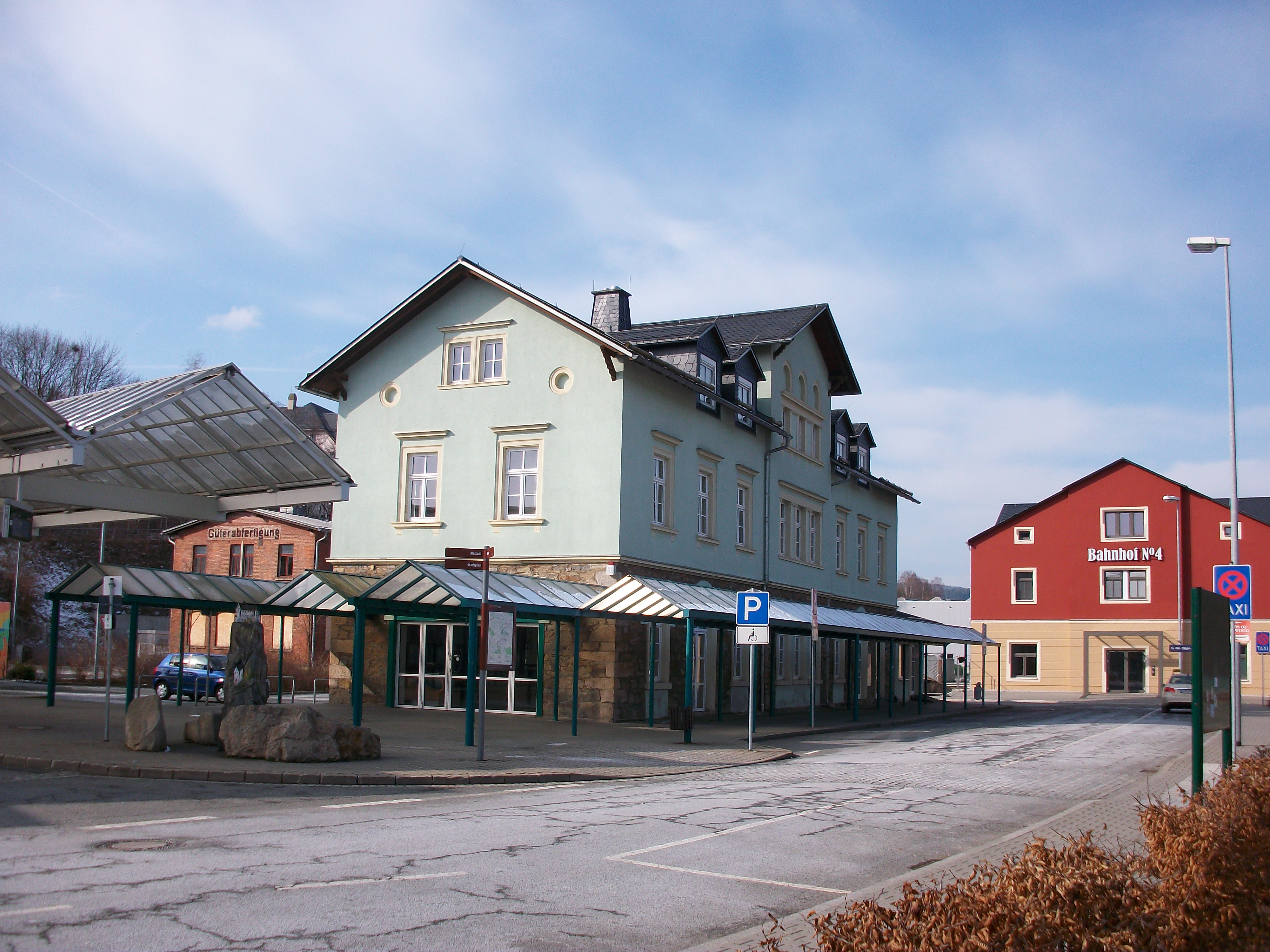 Bahnhof Schwarzenberg/Erzgebirge mit Busbahnhof